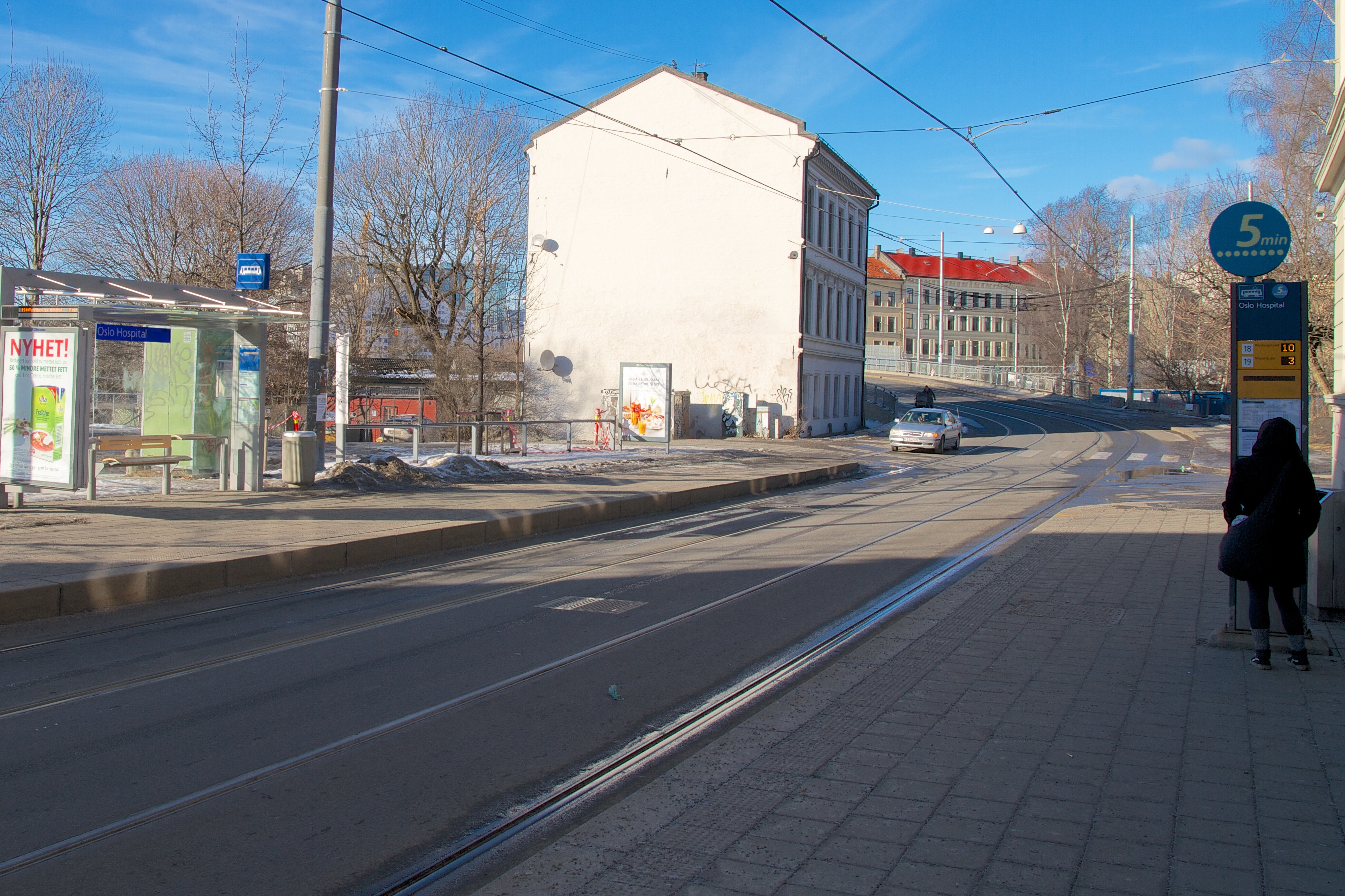 Oslo Hospital holdeplass